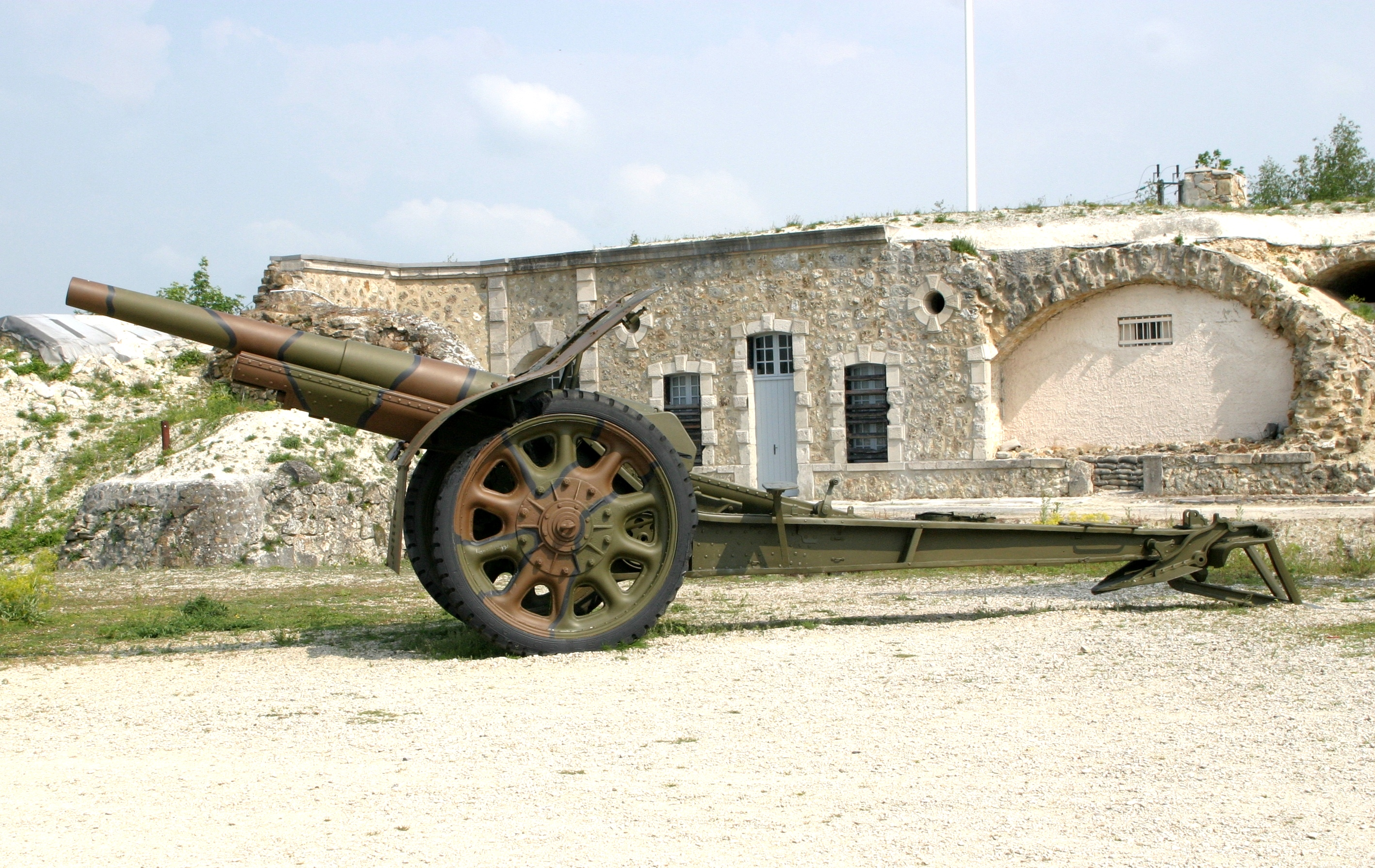 Eng 105 mm Schneider Kanoun um Glacis vum Fort de la Pompelle. Dës Schneider Kanoun kënnt aus Italien, wou se ënner Lizenz vun der Firma Ansaldo vu Genua 1918 gebaut gouf. Et ass awer net nozevollzéie wéi a firwat datt se an der Champagne gelant ass.